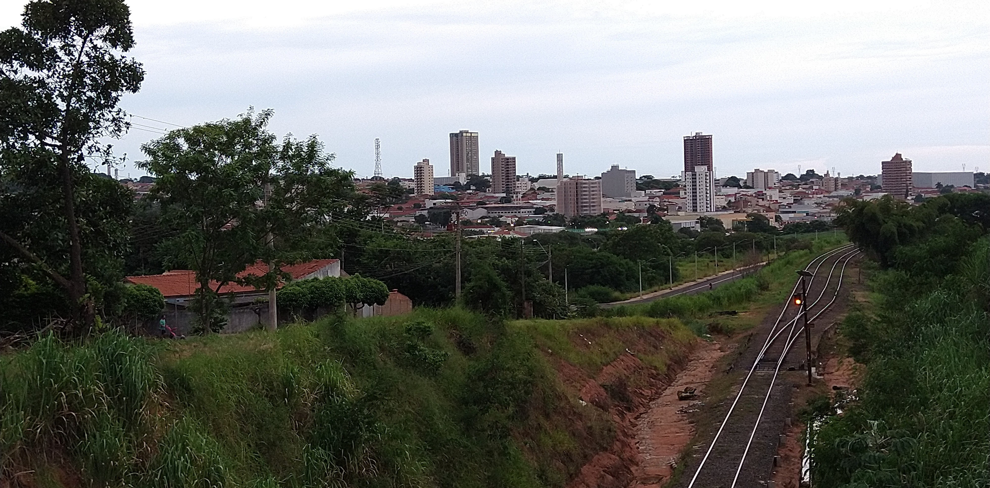 Vista do pontilhão da linha férrea da avenida São Paulo para o centro da cidade